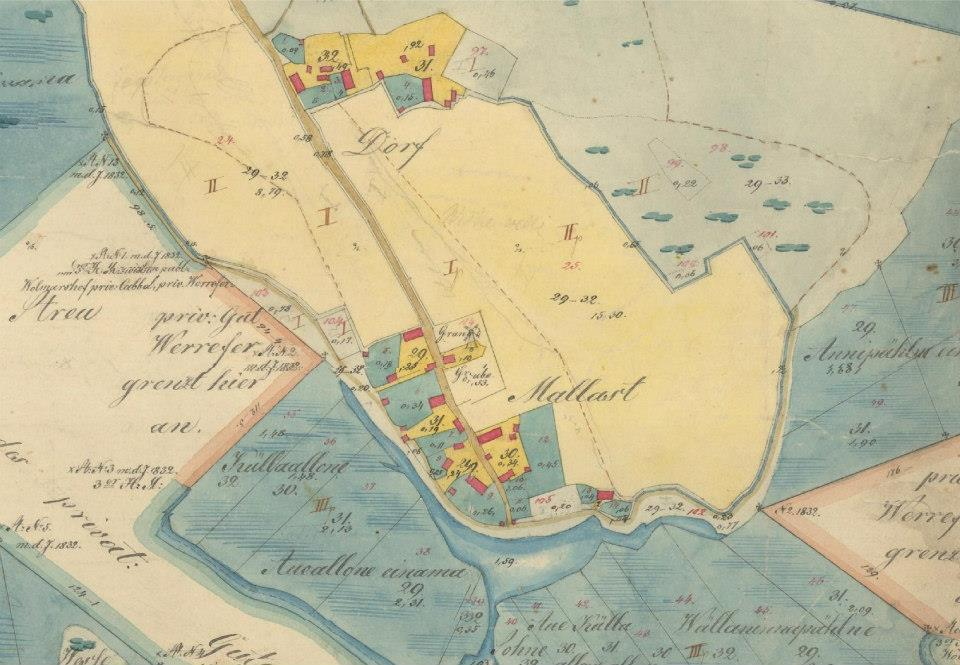 Maalasti küla